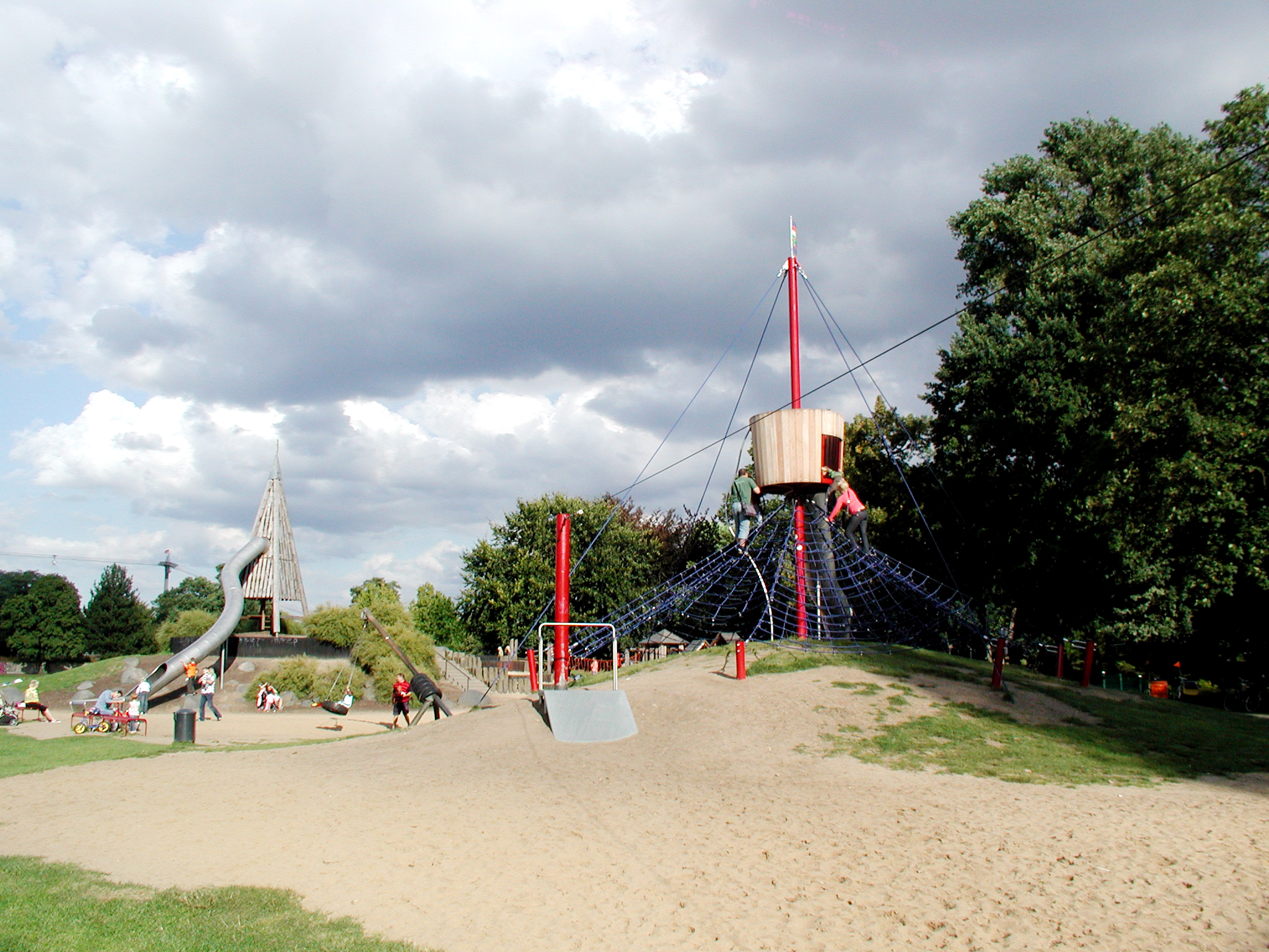 Rheinpark Köln, Spielhügellandschaft zur BUGA 71t